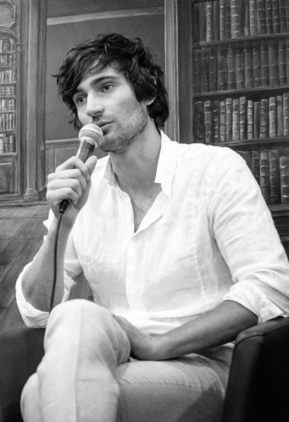 François-Henri Désérable